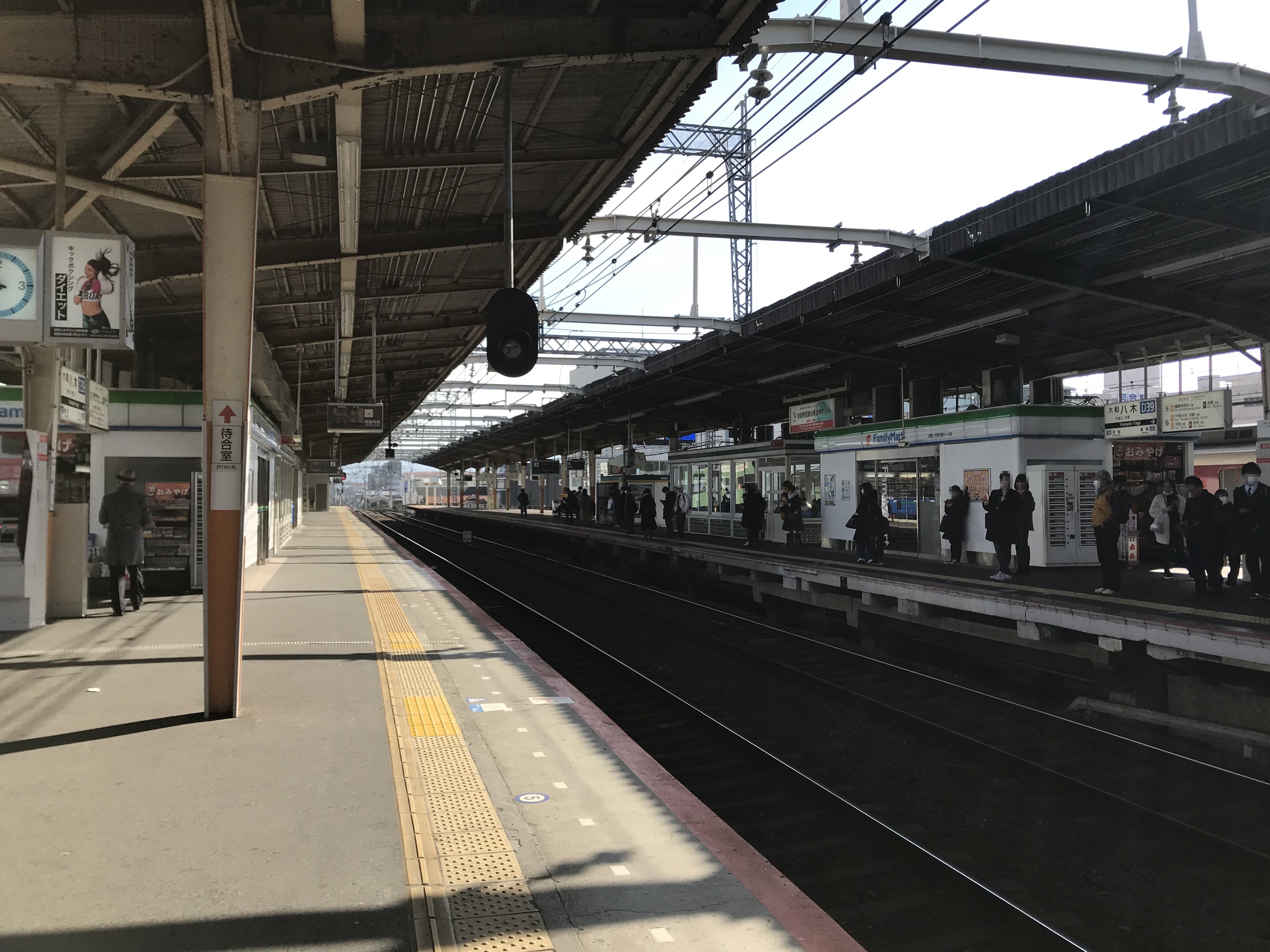 大和八木駅(大阪線)のホーム(奥は耳成方面)